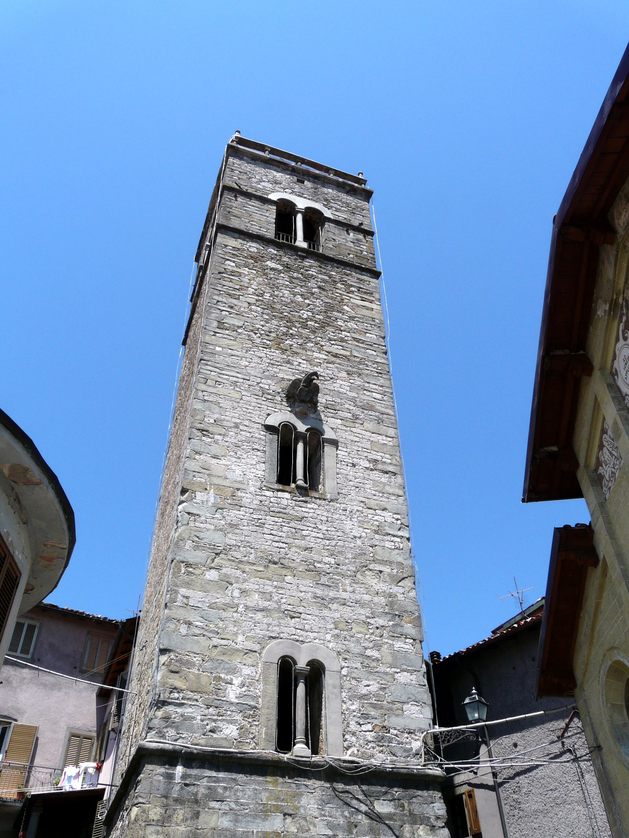 Campanile della chiesa di San Lorenzo, Corfino, Villa Collemandina, Toscana, Italia